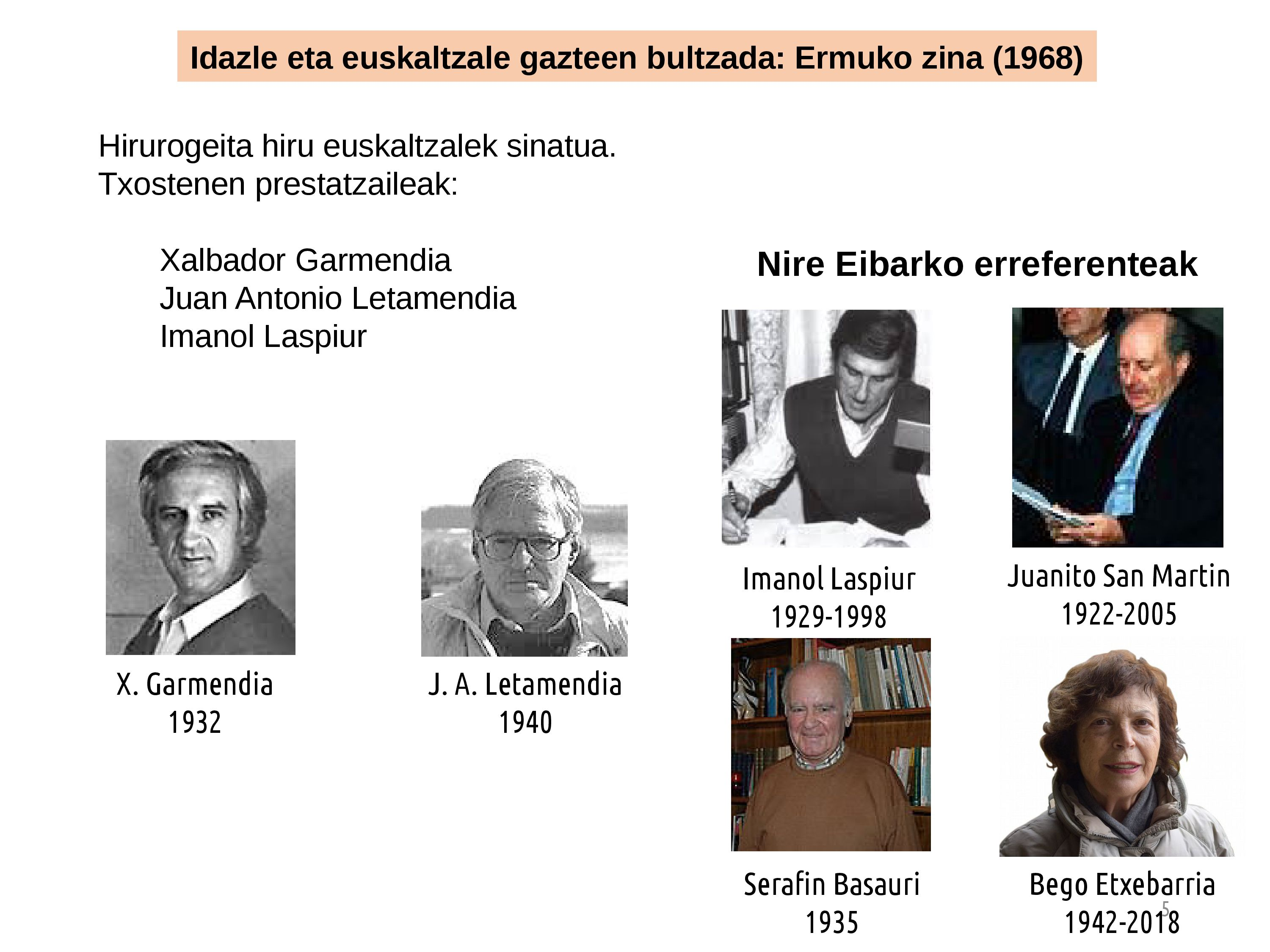 1968ko Ermuko zina: idazle eta euskaltzale gazteen bultzada ). Euskara Batuaren helduaroa Jardunaldiaren barruan (Gasteiz, 2018-06-21). Jose Ramon Etxebarriak bere hitzaldian euskarazko testugintzan bere helburuak, lanak eta bidelagunak aipatu zituen (Euskarazko testugintza. Amaitu gabeko historiaren atal baten bertsio pertsonala).